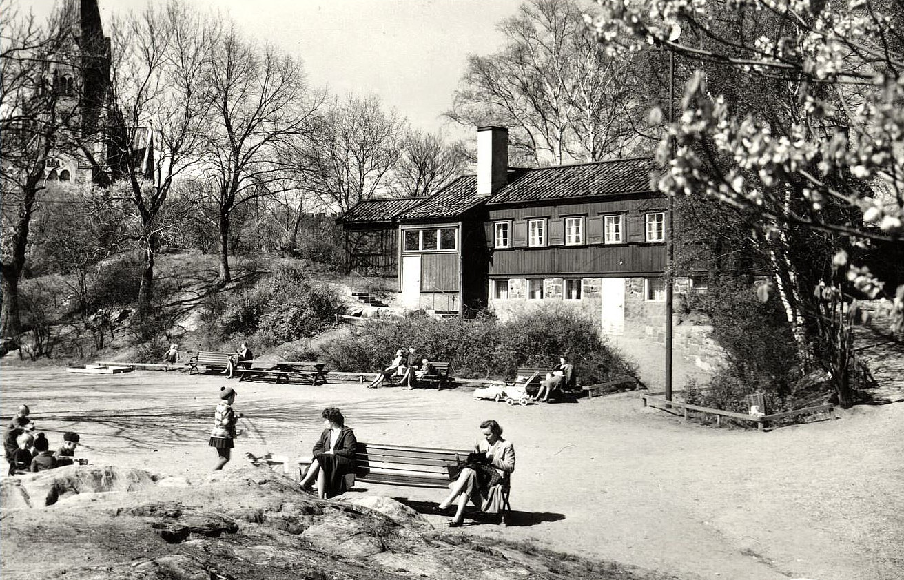 Ceders Café i Vitabergsparken på ett vykort.